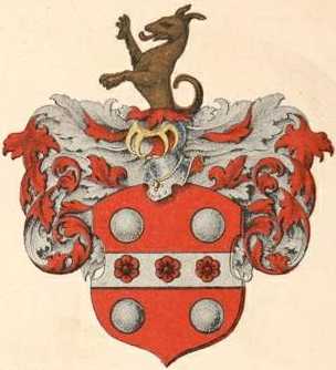 Braschi suguvõsa aadlivapp